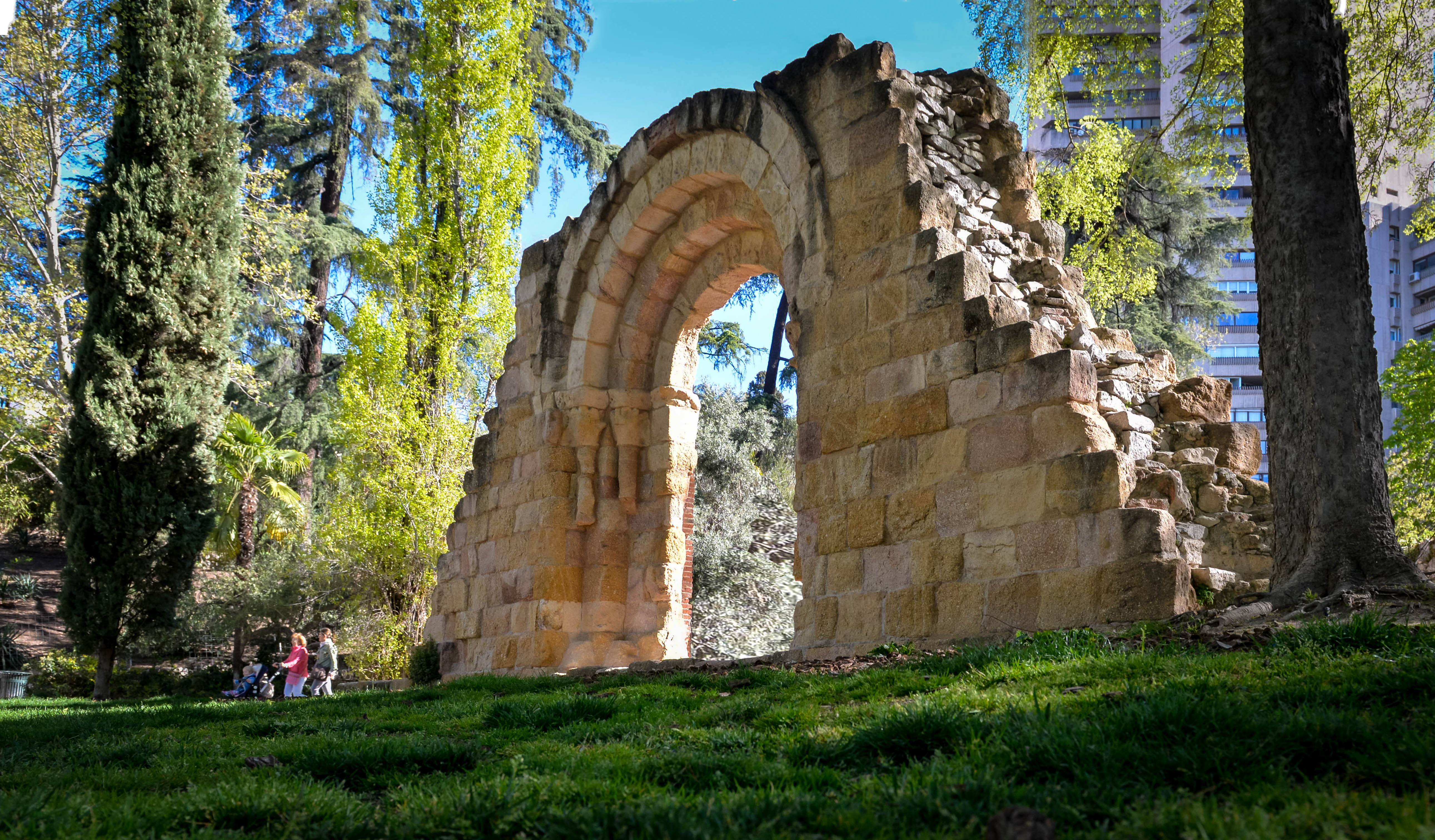 Madrid_-32.jpg